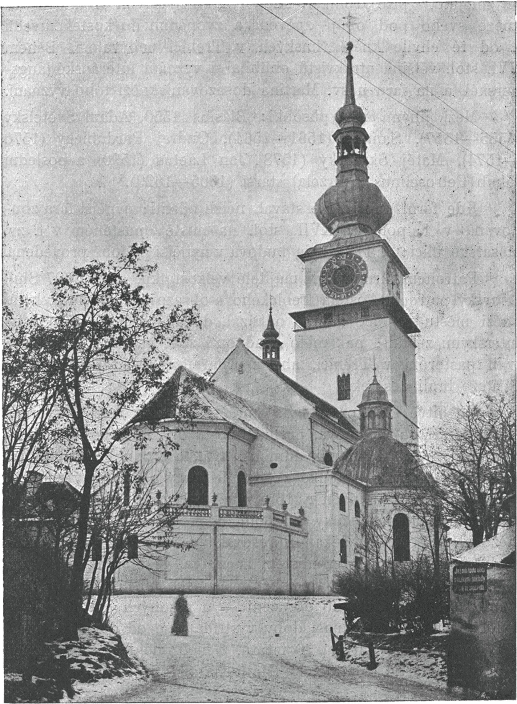 Městská věž v Třebíči po rekonstrukci v roce 1905